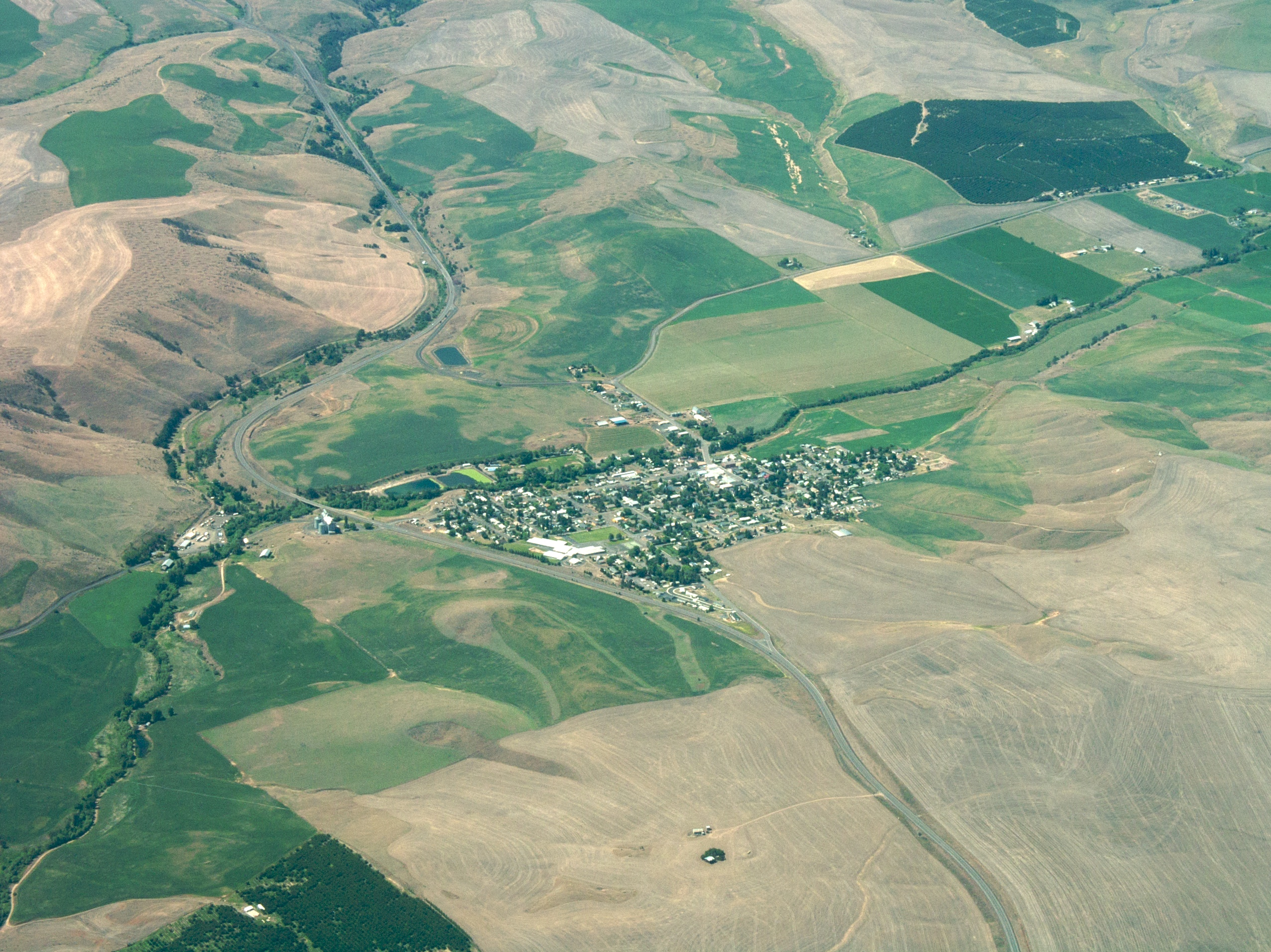 Dufur, Oregon